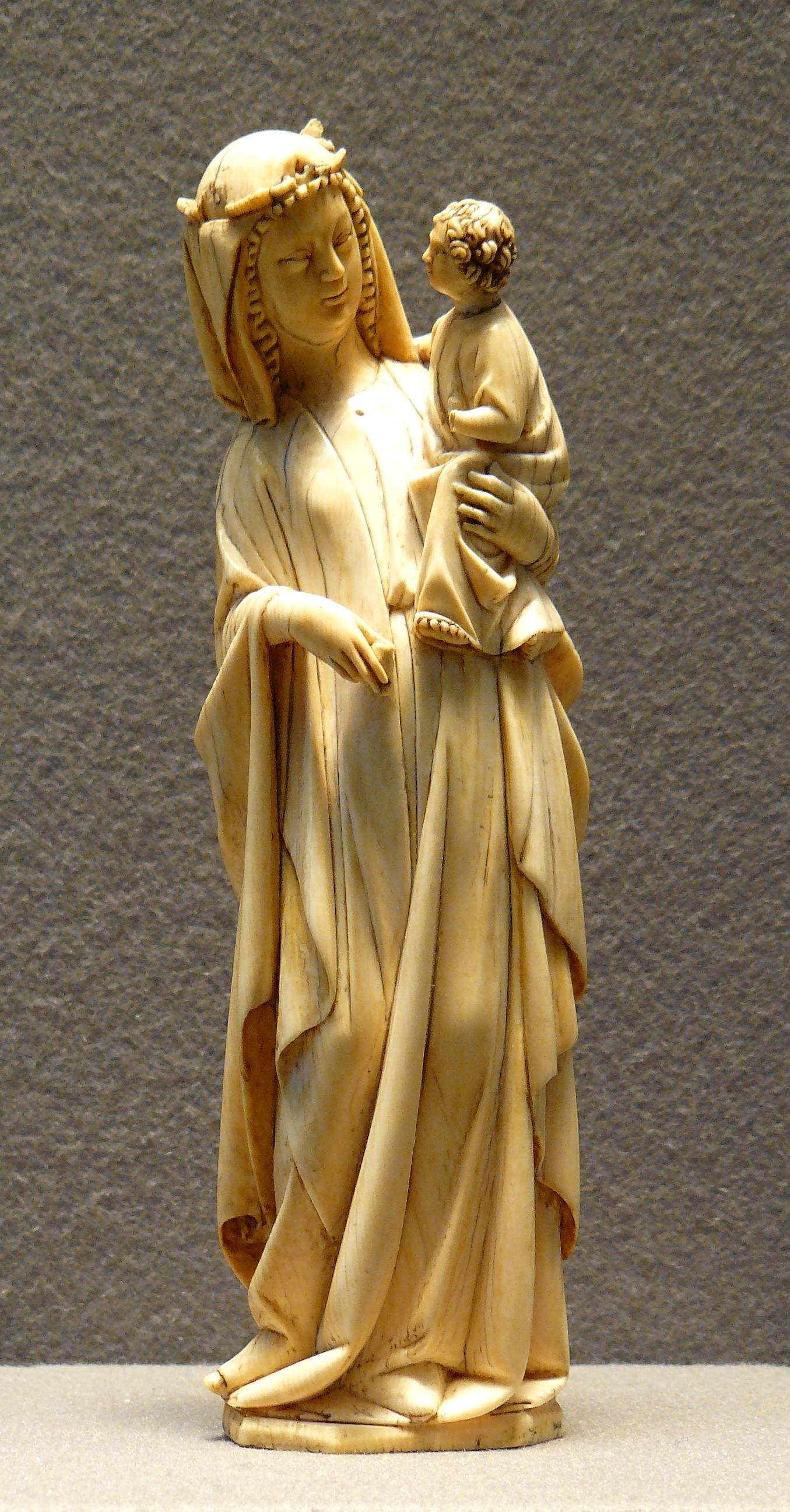 Statuette en ivoire dite "Vierge à l'Enfant debout" (hauteur environ 25 cm) - Paris, fin du XIIIème siècle - Musée du Louvre, Inv. n° OA 9490